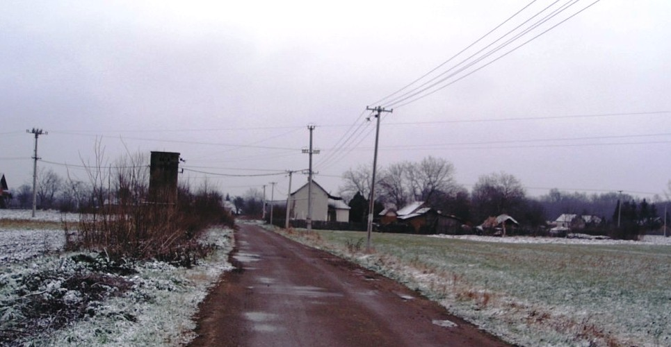 Лисо Поље.